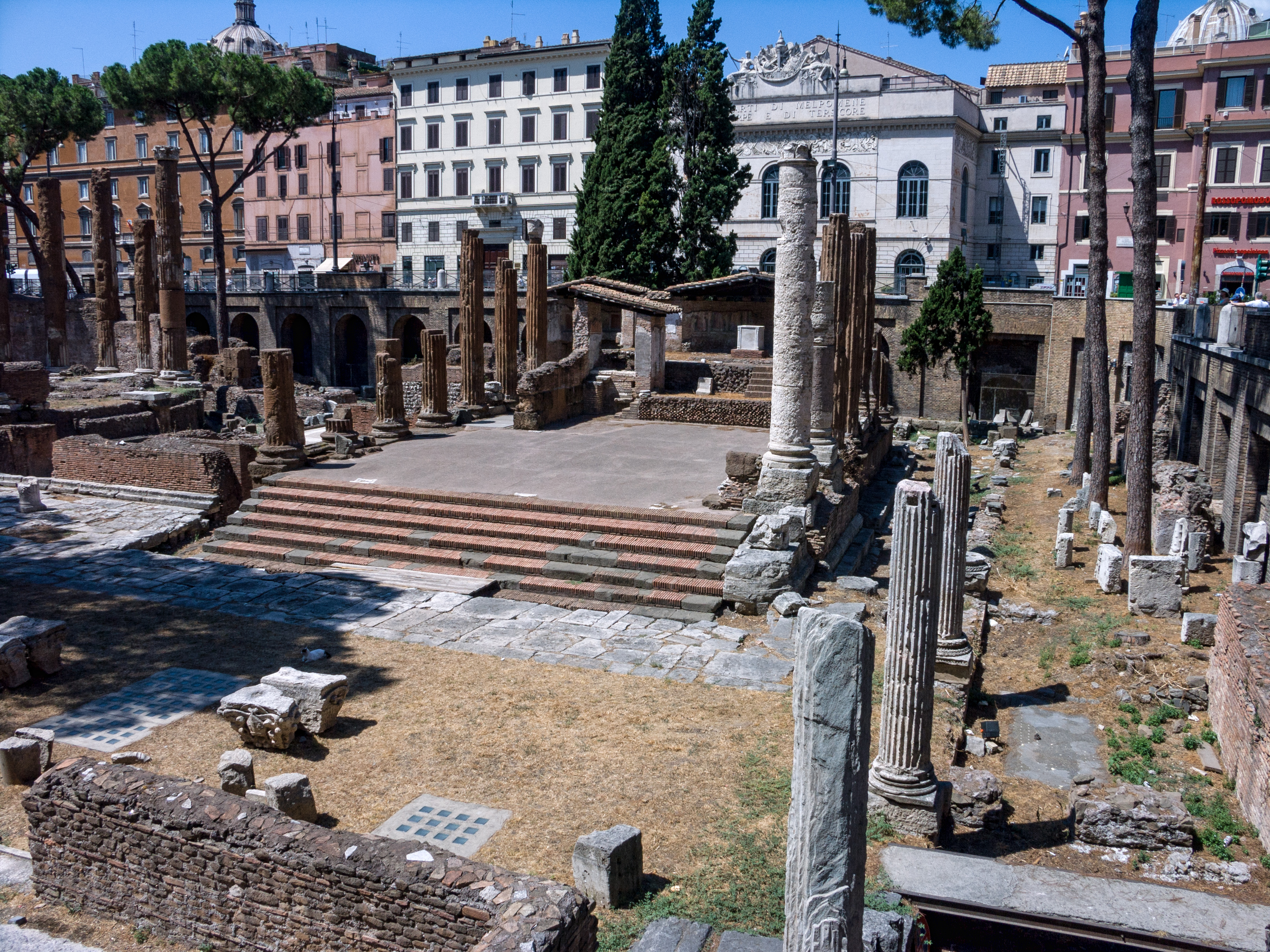 Area Sacra du Largo Argentina : Temple A